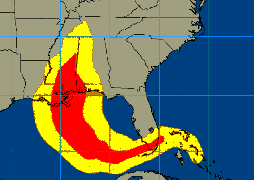 Priskribo Mi faris tiun ĉi mapon per la programo Paint el partoj de la imago Image:Hurricane_Katrina_wind_swath.gif, kiu estas en la Komunejo kaj estas ĉies proprietaĵo (ĉar publika eldonaĵo de la usona registaro). Mi rezignas pri la propra kopirajto kaj libere uzebligas ĝin al ĉiuj.